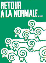 Atelier Populaire des Beaux-Arts de Paris Atelier Sérigraphie d'Hector Cattolica